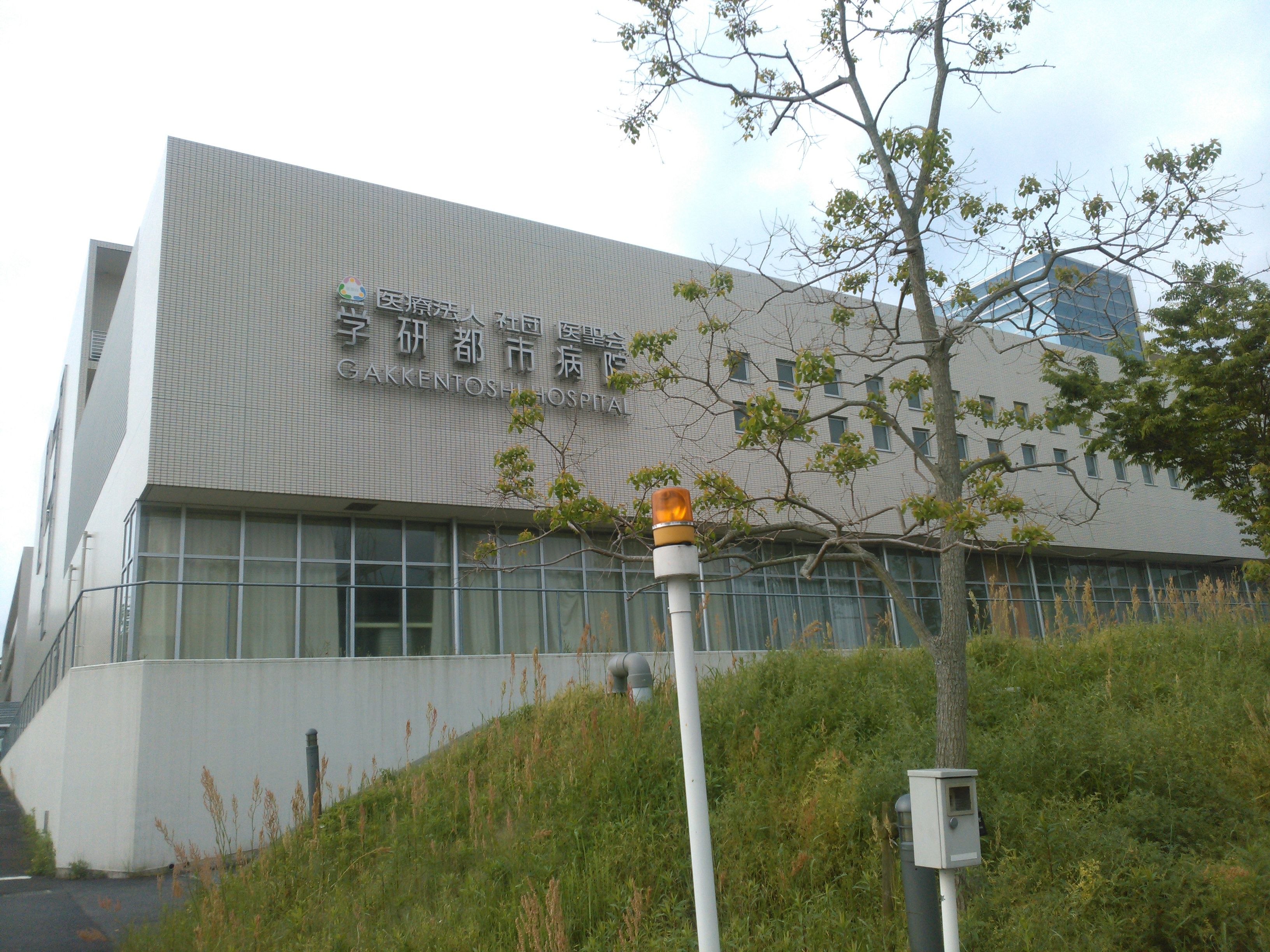 学研都市病院